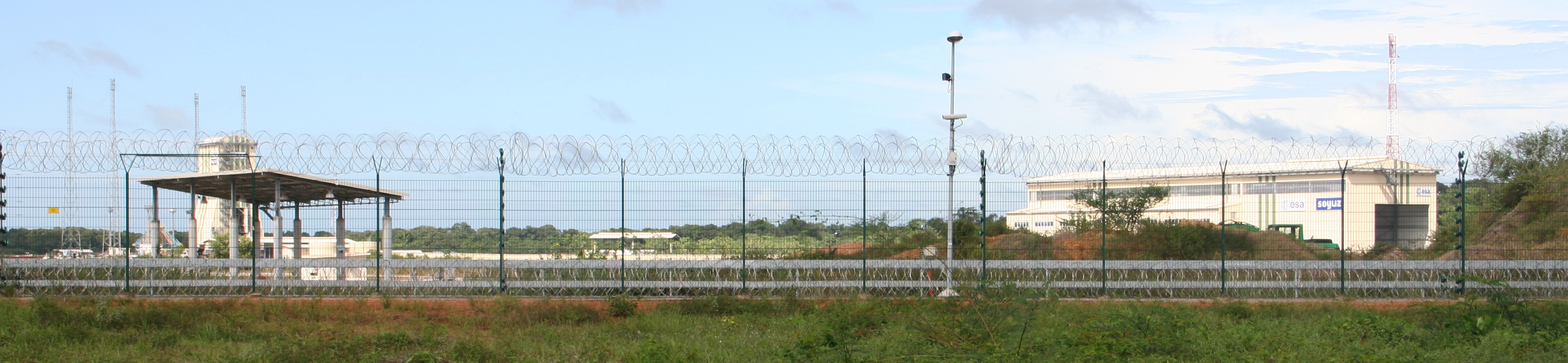 Ensemble de lancement Soyouz au Centre Spatial Guyanais